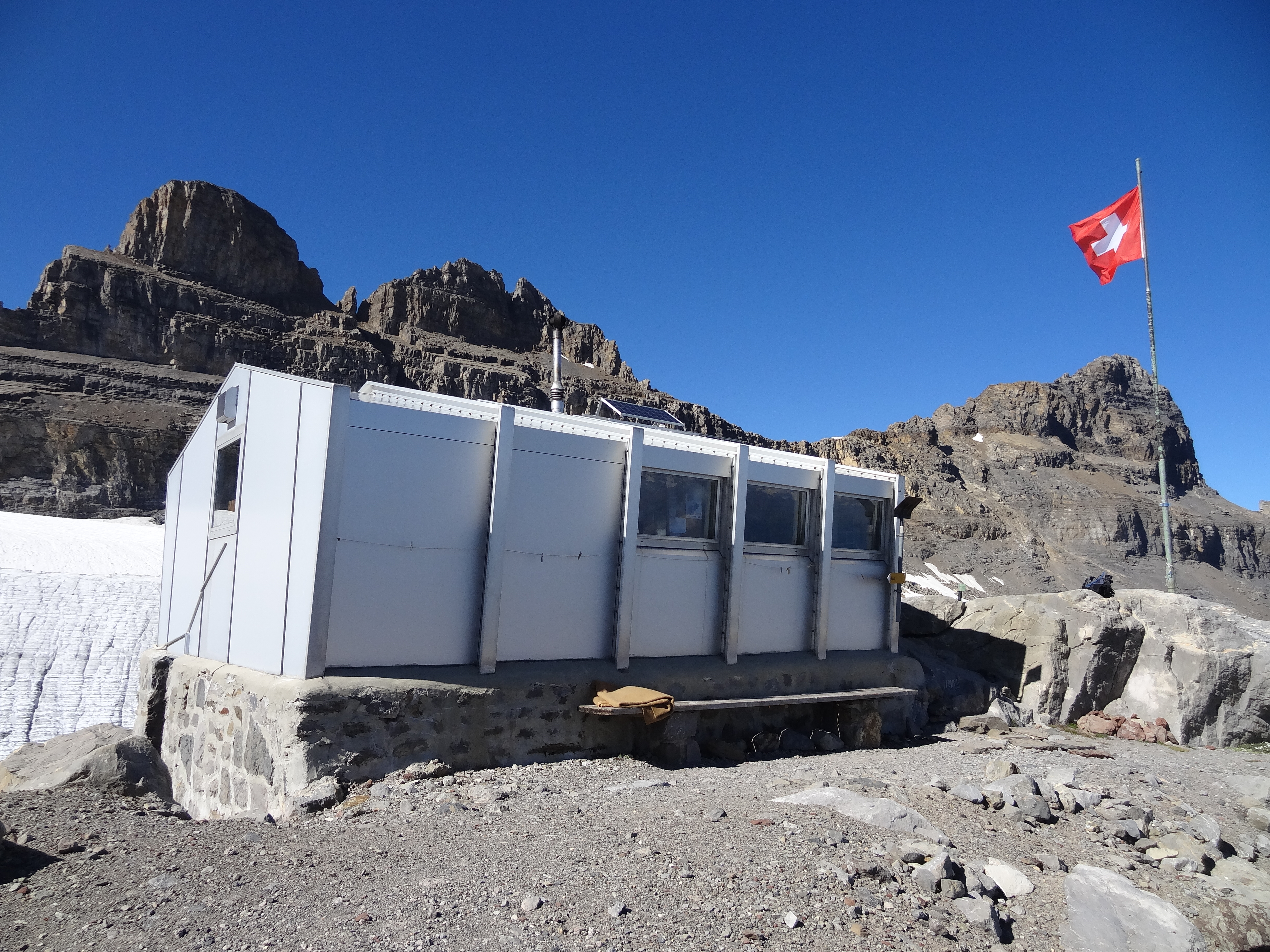 Refuge des Dents du Midi on summer